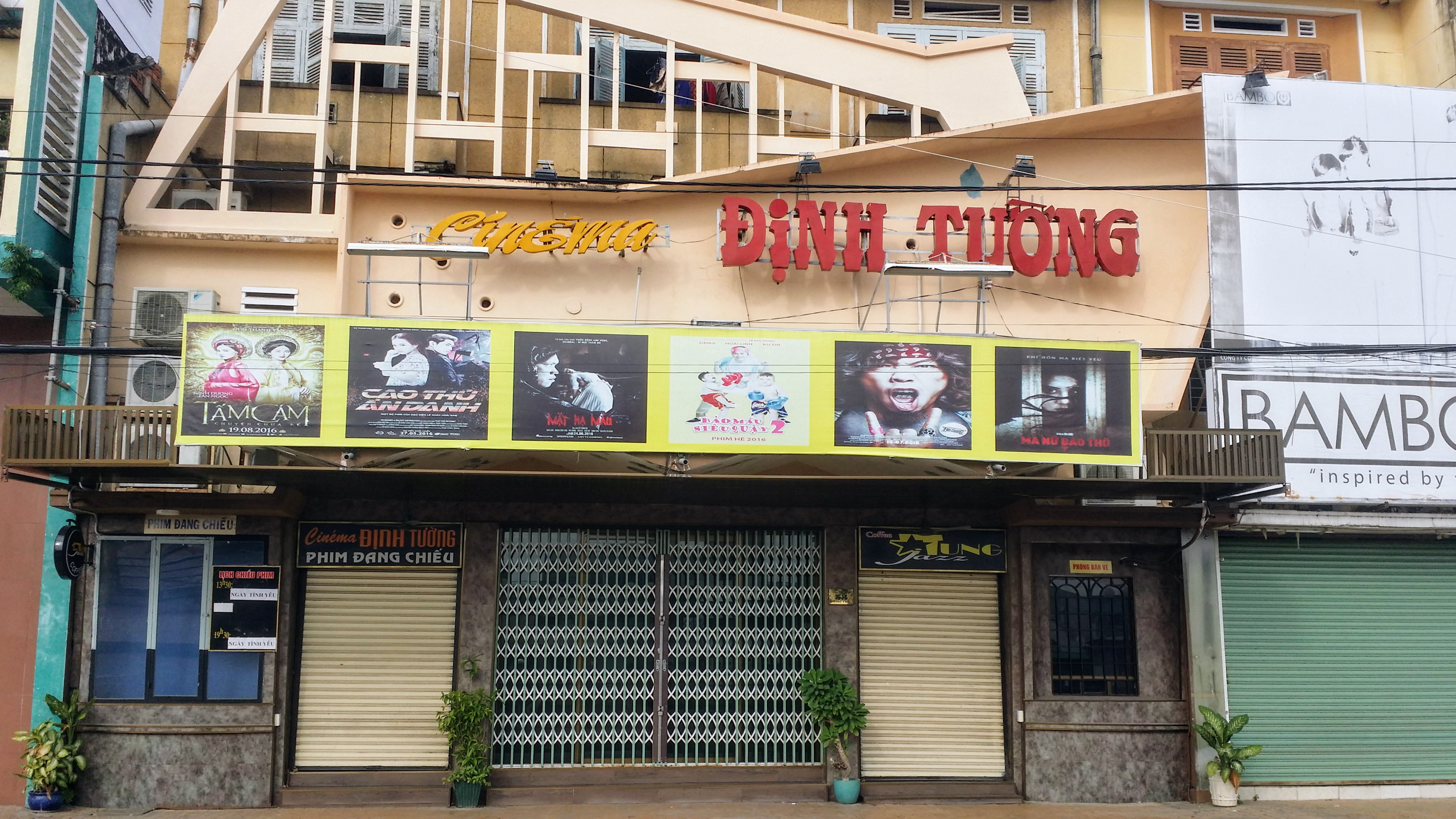 Rạp phim Định Tường tại phường 1, thành phố Mỹ Tho